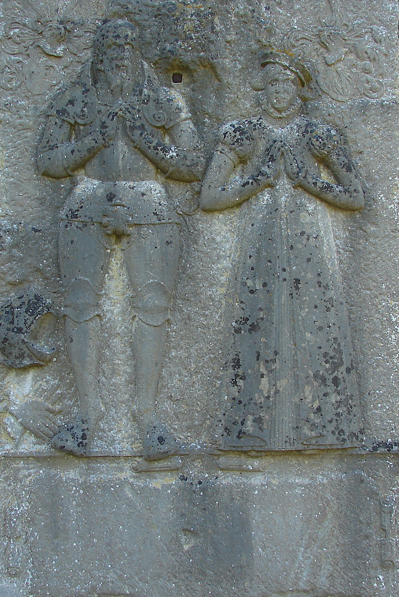 Gumløse, gravsten på kirken, Gønge herred, Sverige